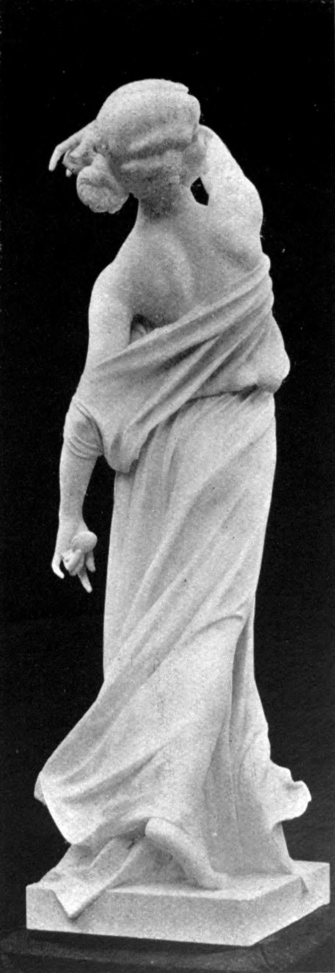 La Danse Profane, commandé par l'état